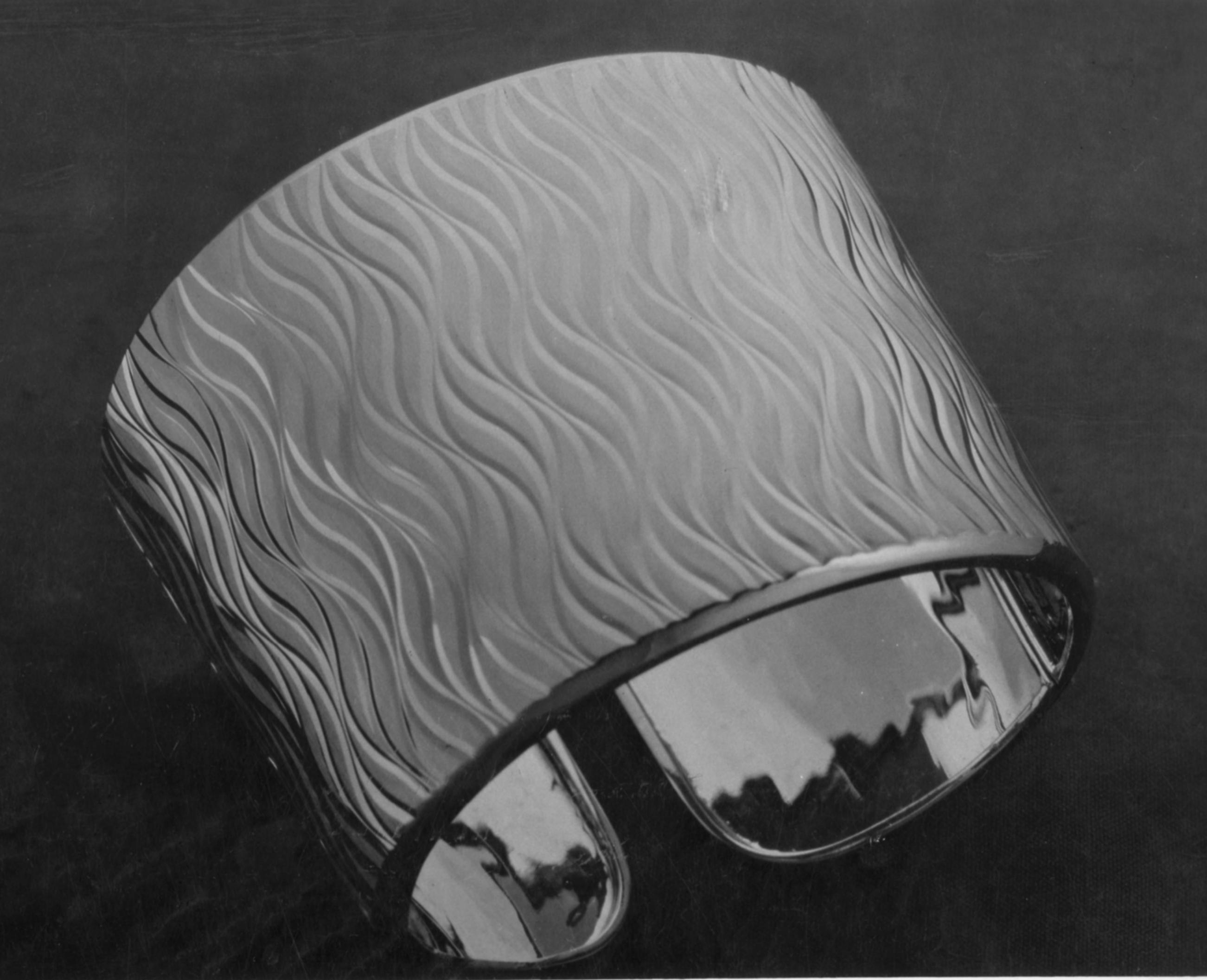 Bracciale alla schiava in oro inciso con la tecnica guillocher o ghiglioscé, prodotto del distretto orafo di Valenza, ITALIA